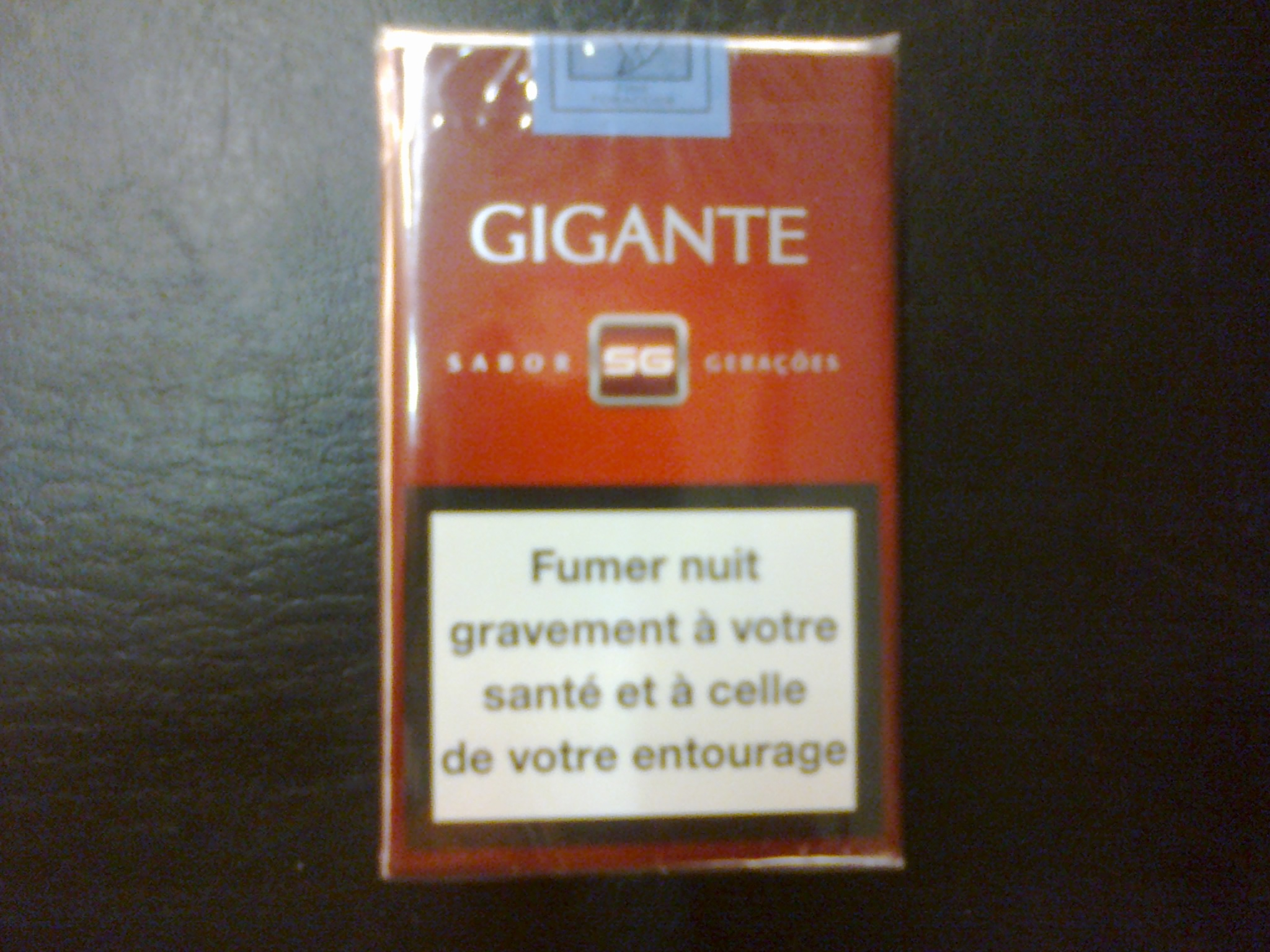 Cigarettes SG